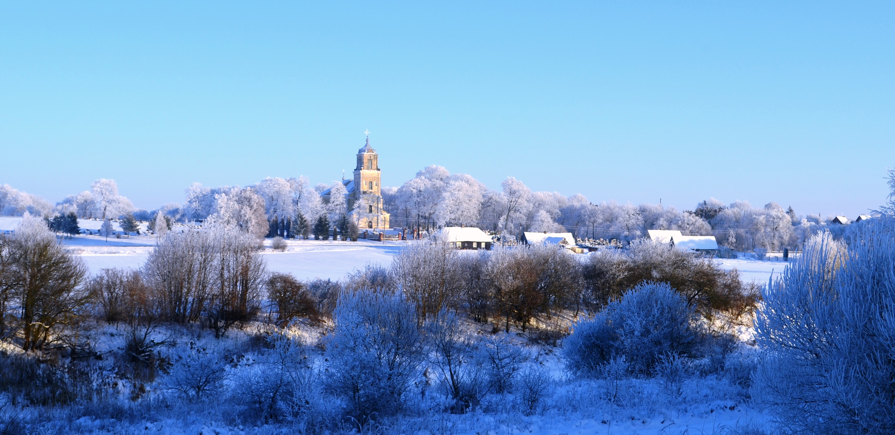 Apytalaukis nuo kito Nevėžio kranto, Kėdainiai